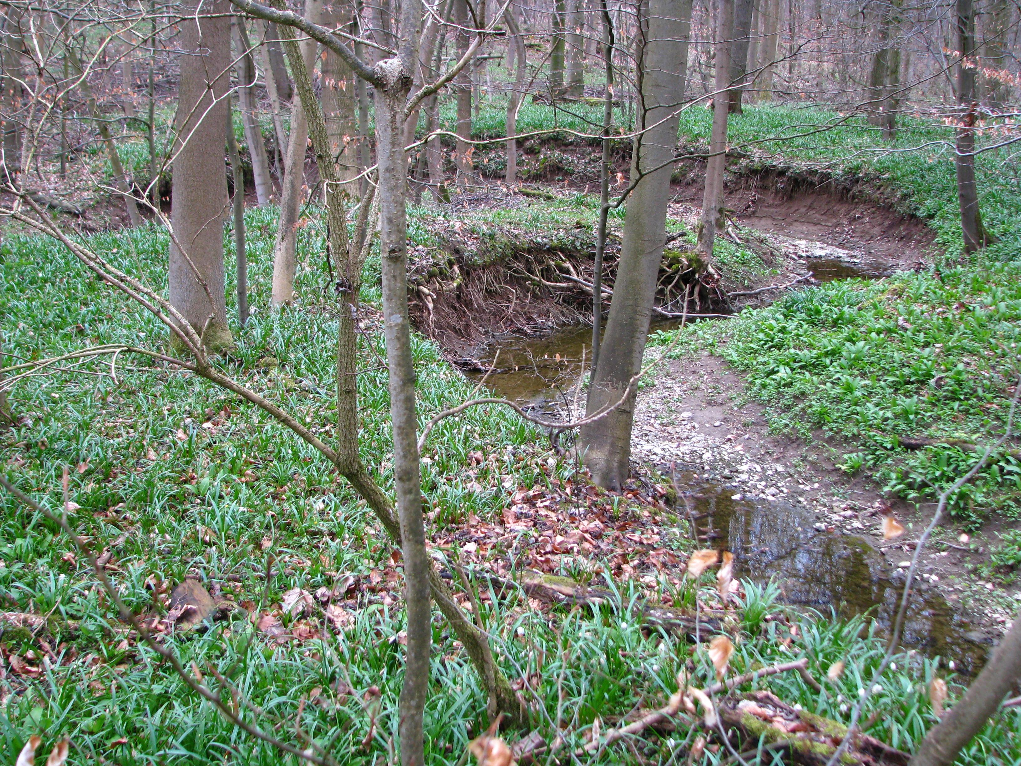 Mäandrierender Bachlauf im Schaftal im Volkenroder Wald. Der Bach führt nur selten Wasser, wie auf diesem Bild nach der Märzenbecherblüte und vor dem Laubaustrieb im Frühjahr.